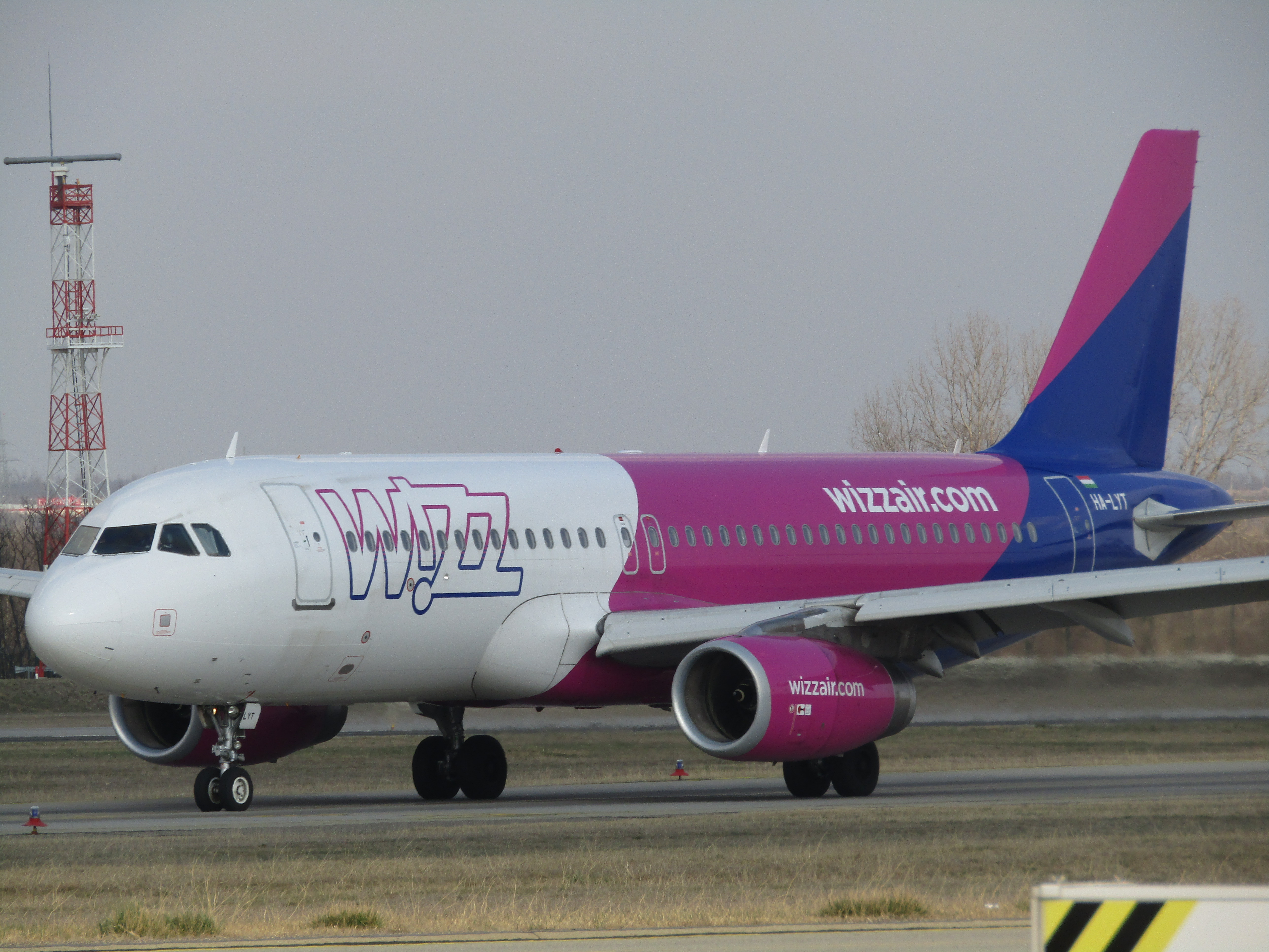 LHBP/BUD 2019.március 24